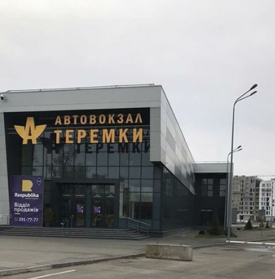 Київ. Автовокзал Теремки